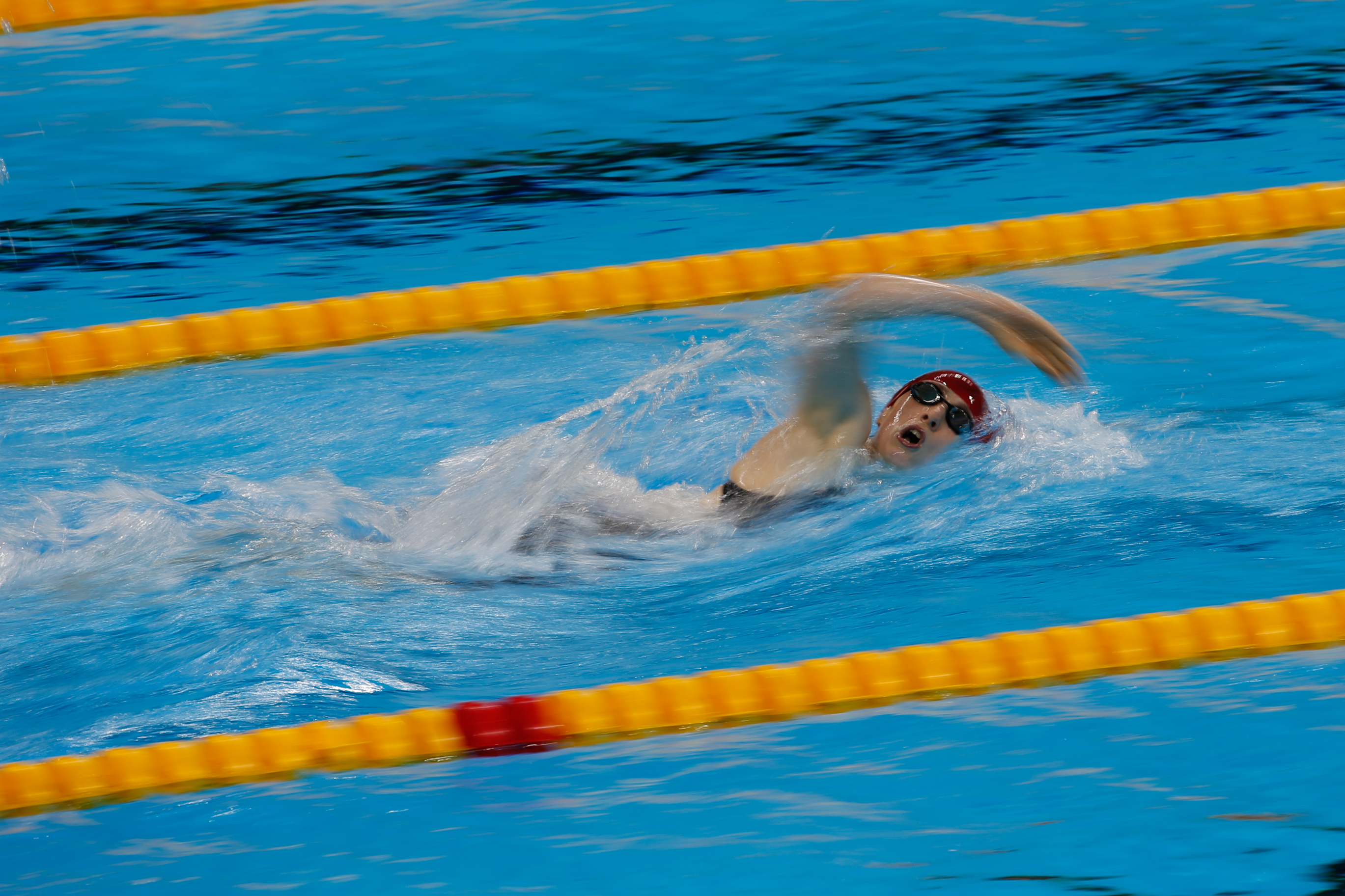 Rio de Janeiro - Bethany Firth, da Grã-Bretanha, leva medalha de ouro nos 200m nado livre S14 nos Jogos Paralmpicos Rio 2016, no Estdio Aqutico.